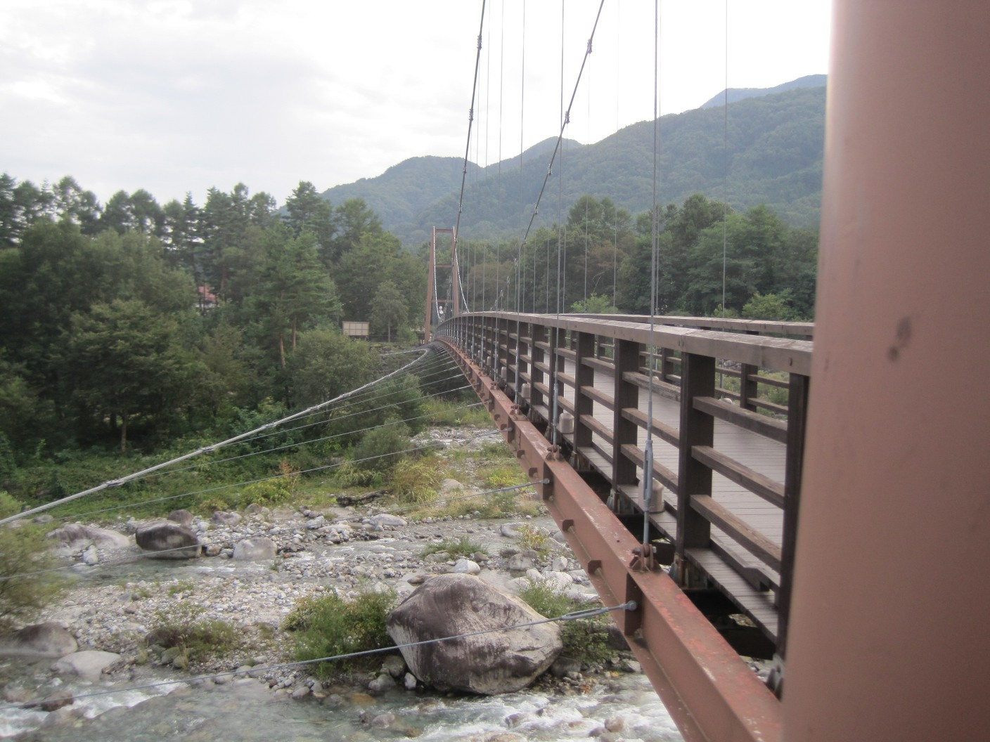 こまくさ橋